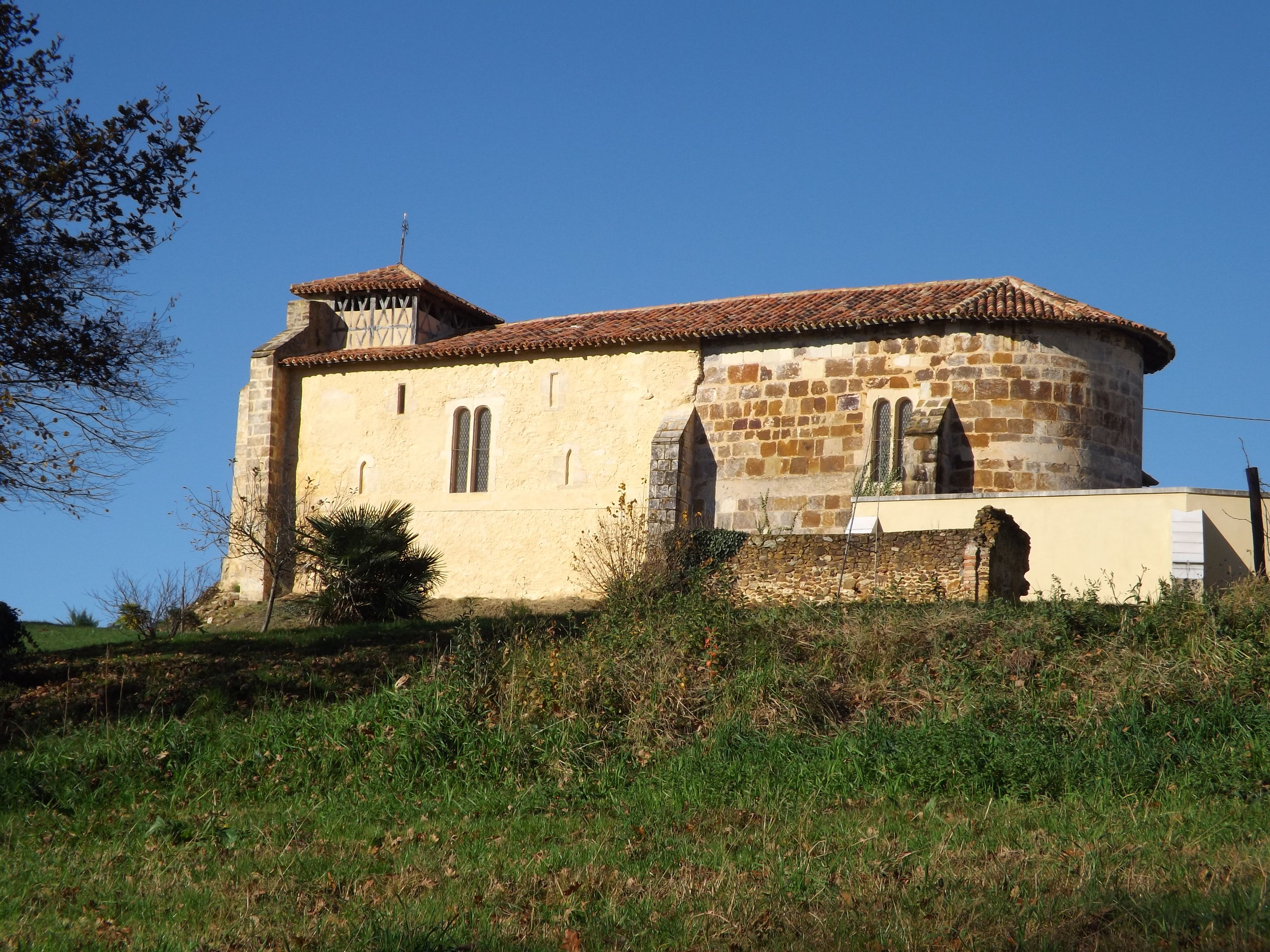 Glèisa de Sent Laurenç de Caupena, Shalòssa, Gasconha